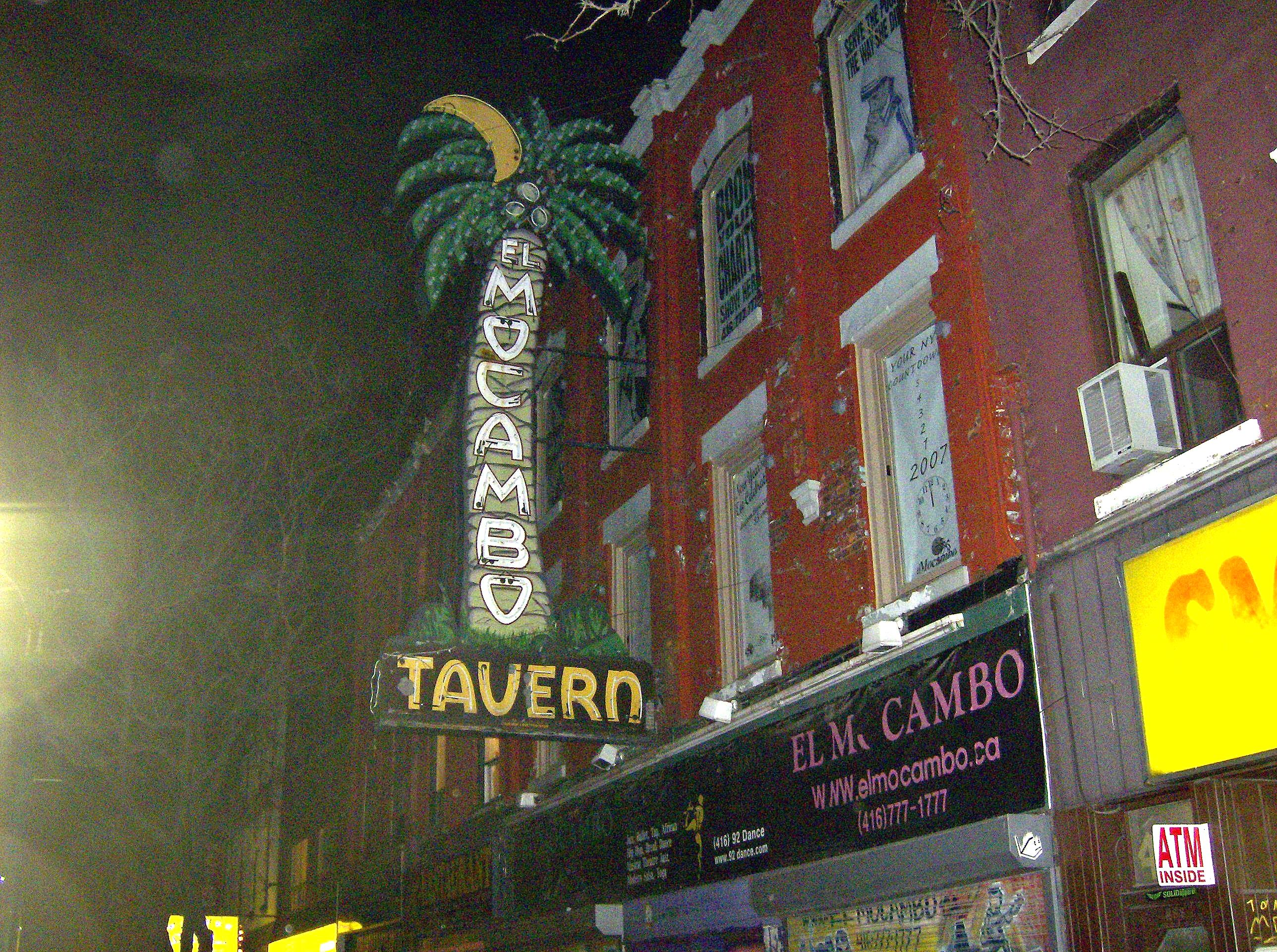 self made